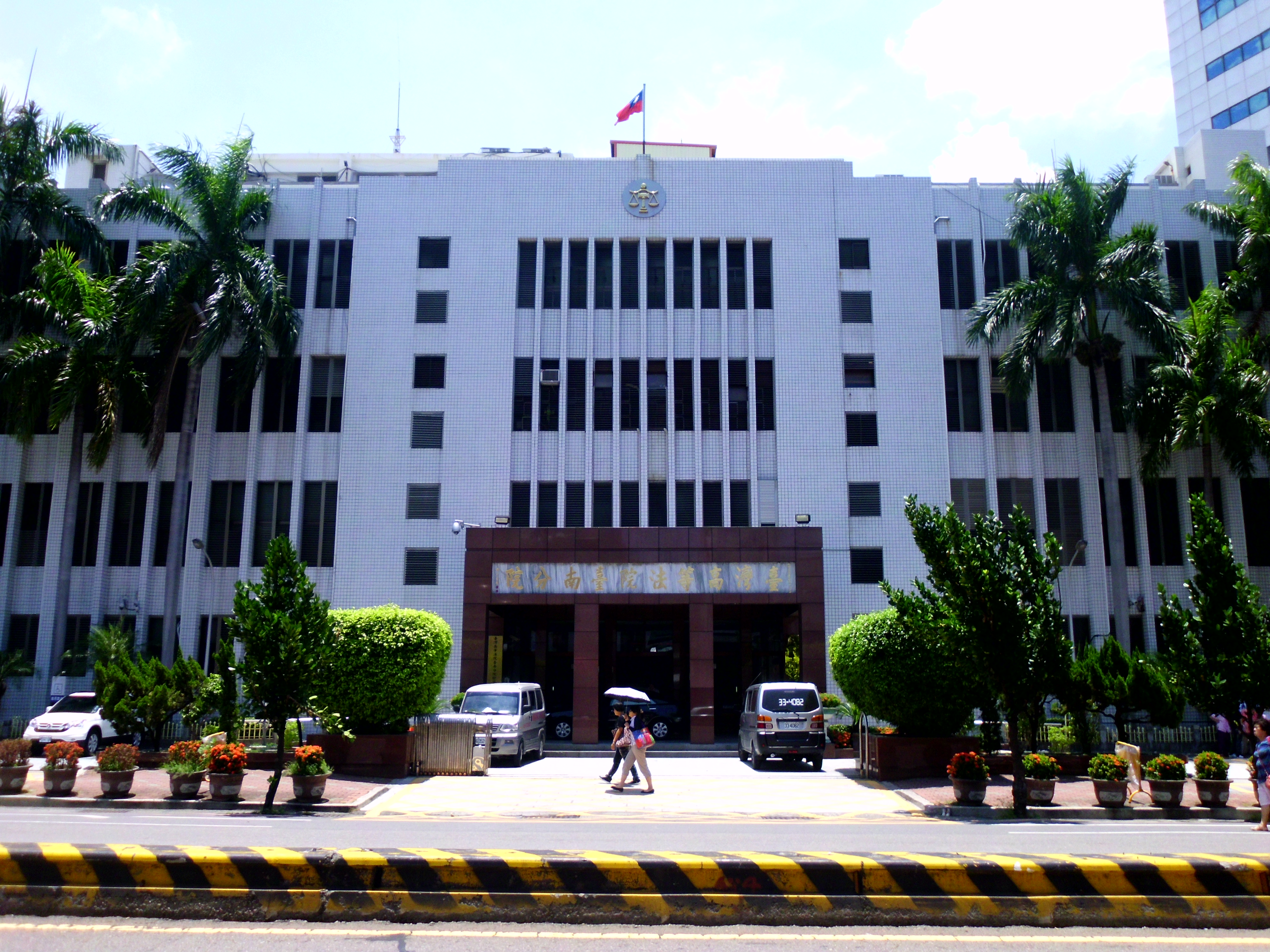 台南高等法院